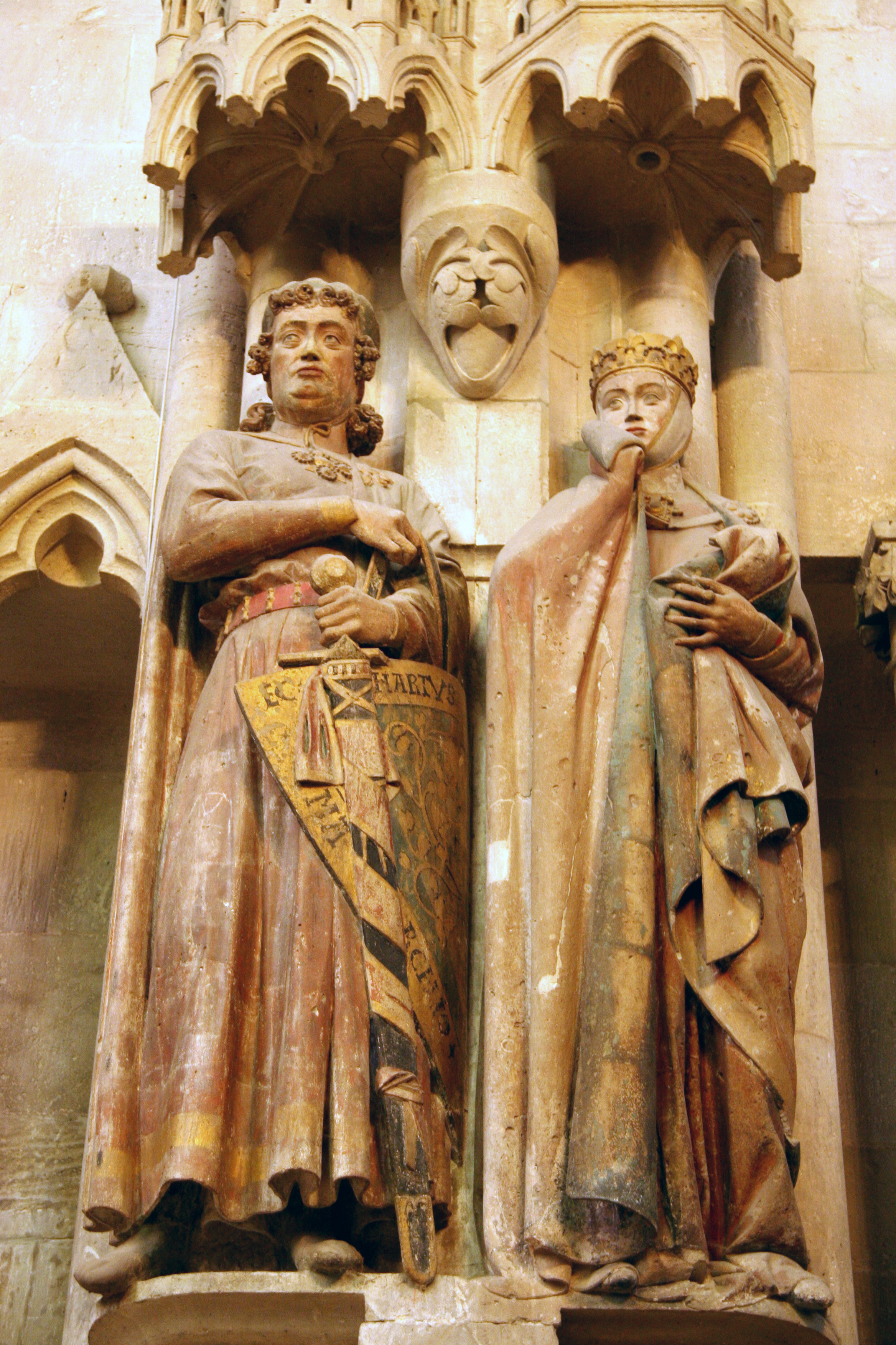 Ekkehard II. und seine Frau Uta, Stifer des Naumburger Doms